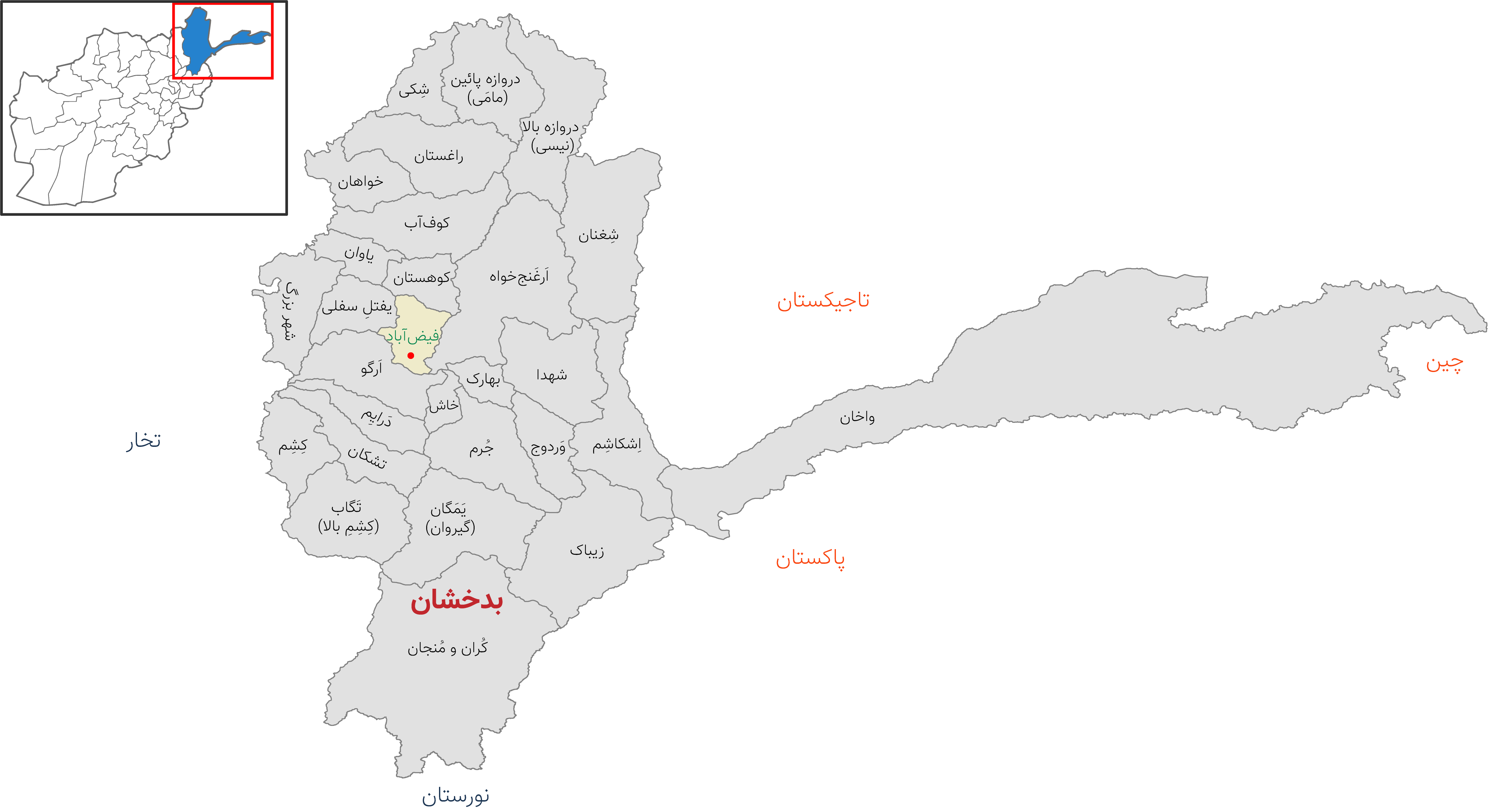 نقشه ولایت بدخشان افغانستان